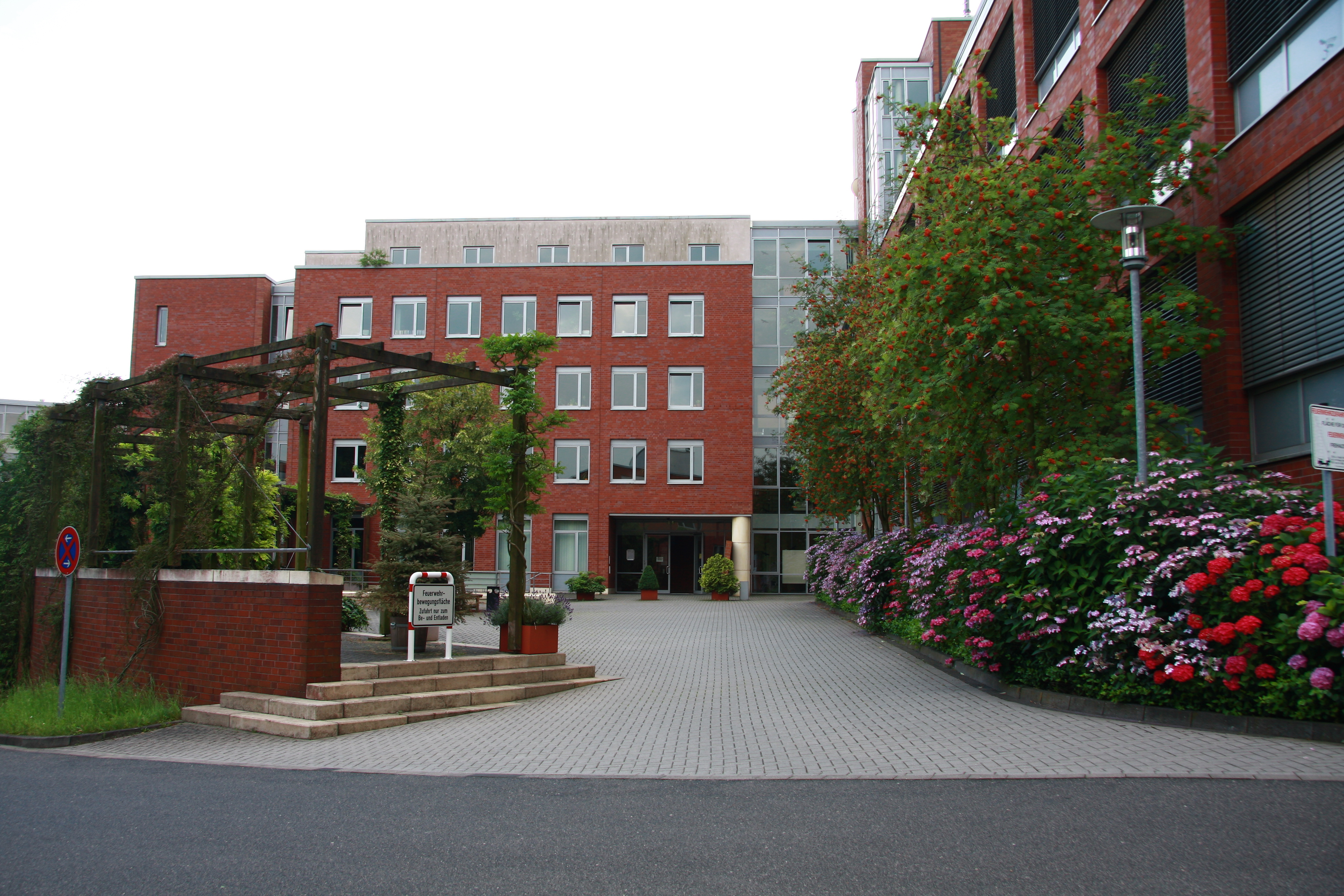 Der Zentralbereich der Fachhochschule des Bundes für öffentliche Verwaltung in Brühl